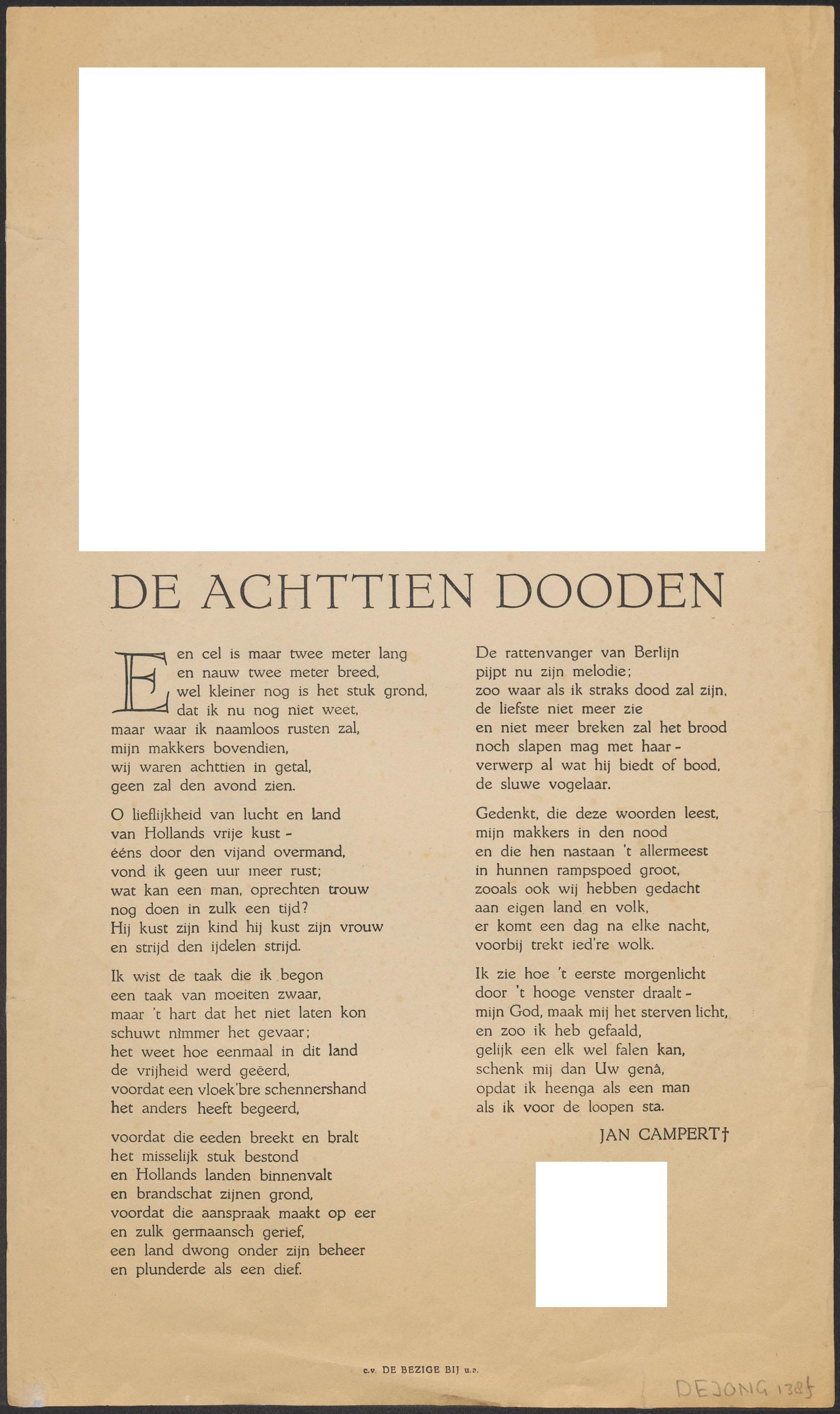 De Achttien Dooden, gedicht jan Campert, uitgave Bezige Bij (illustrations removed by uploader due to copyright), 4e-6e druk